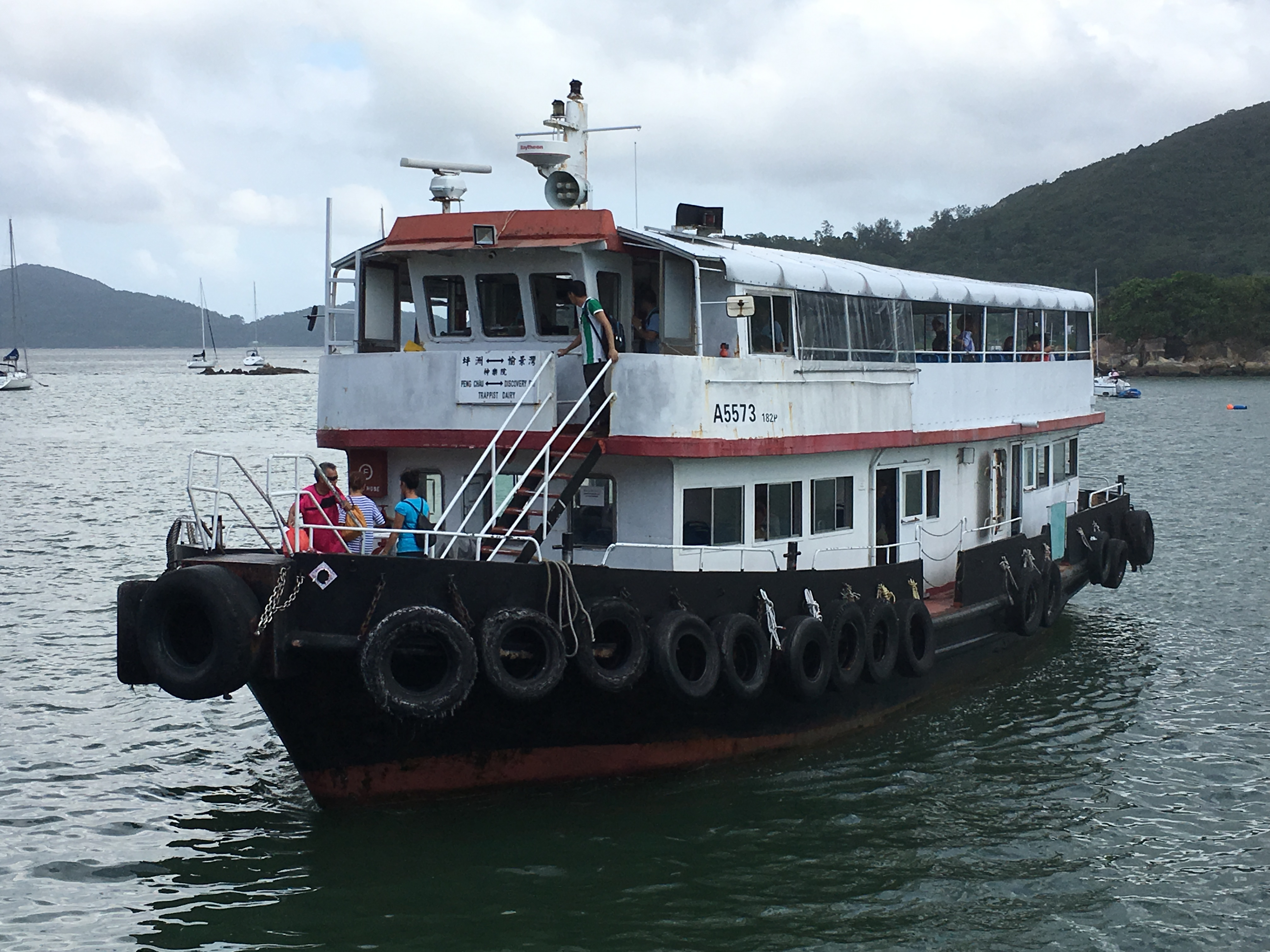 This photo is taken in Discovery Bay.